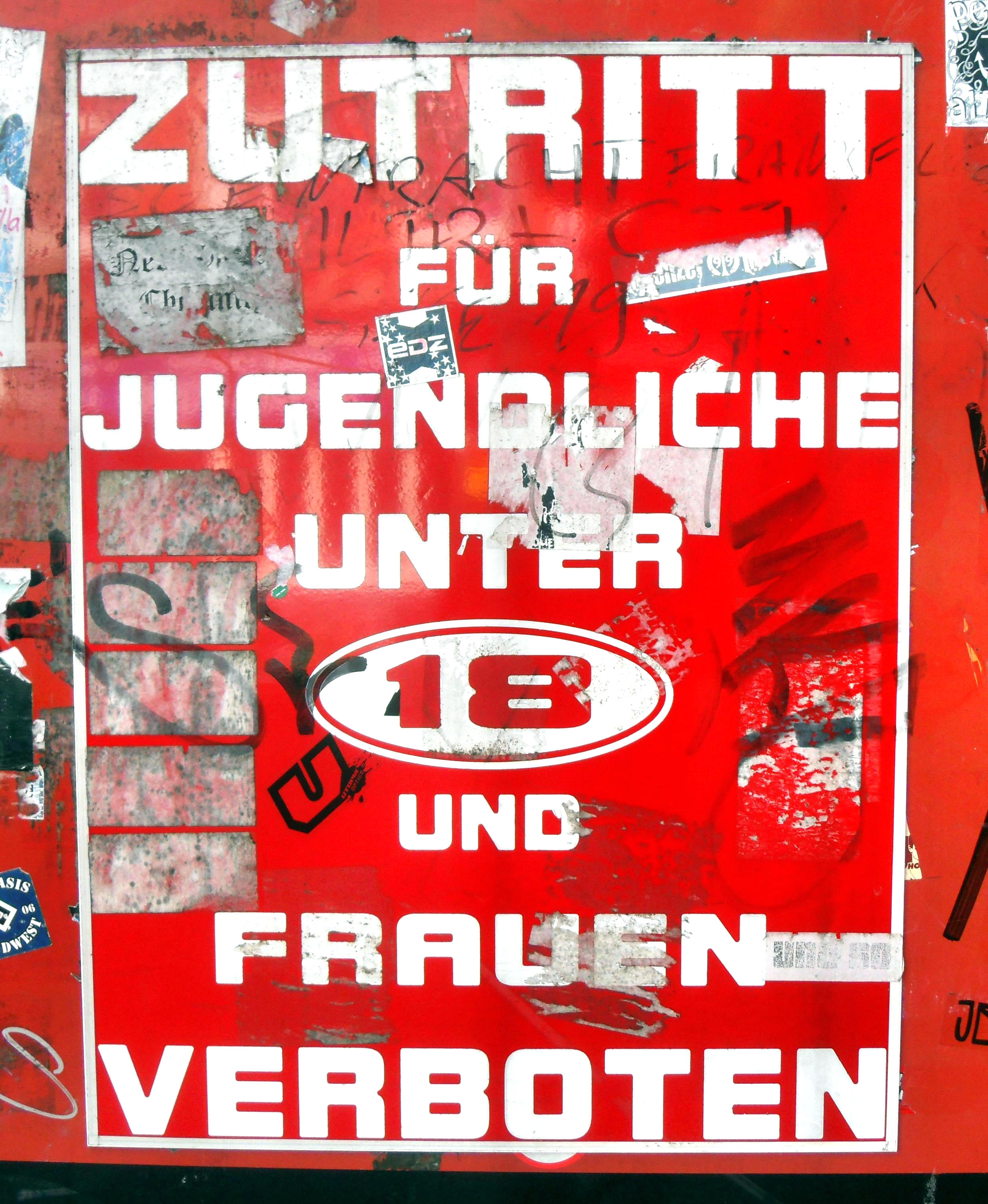 Hinweisschild an dem Eingangstor der Hamburger Herbertstraße (Deutschland) von der Gerhardstraße kommend